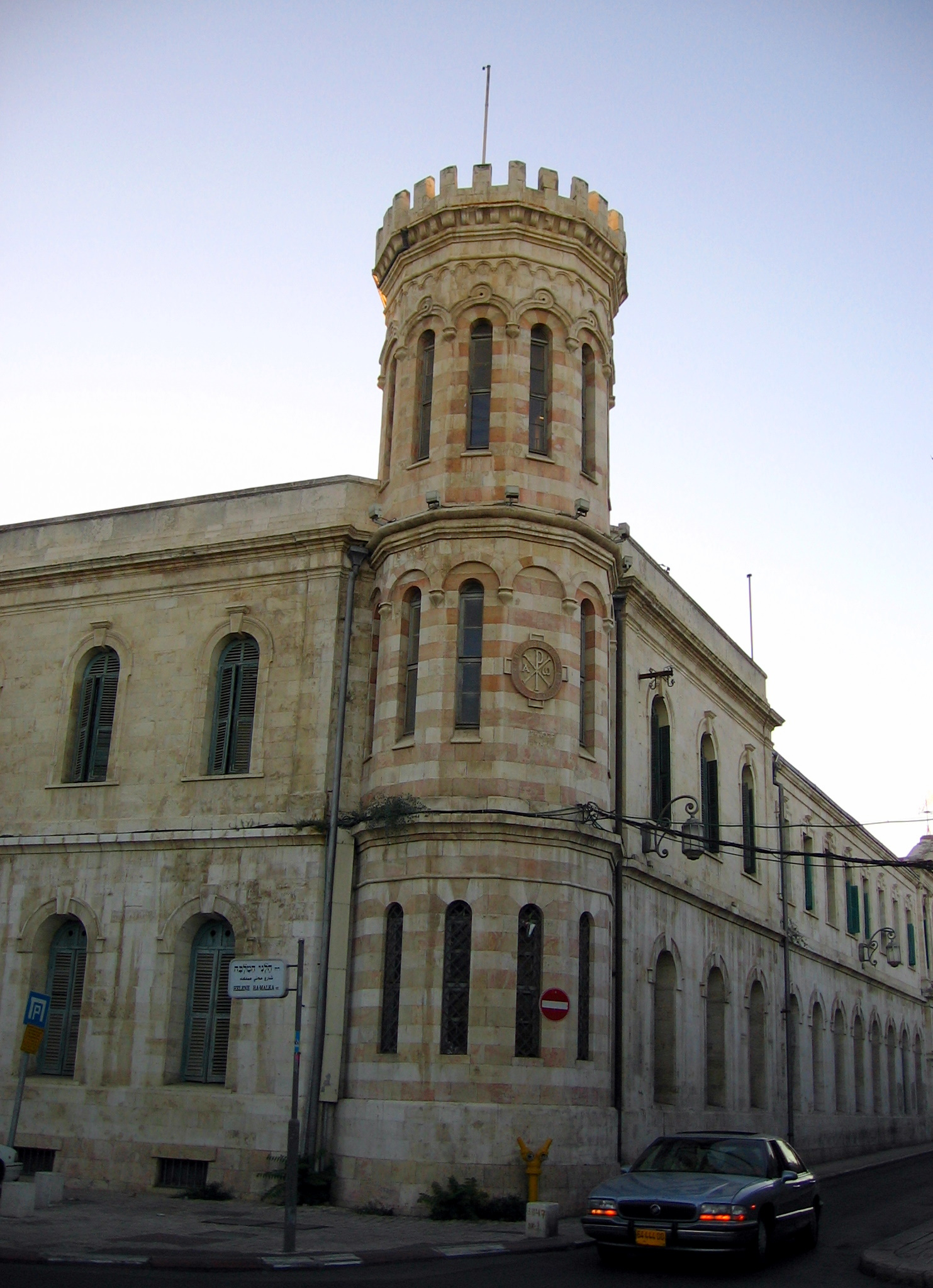 Jerusalem 12-07-2007 19-17-38 1483x2048 Jerusalem